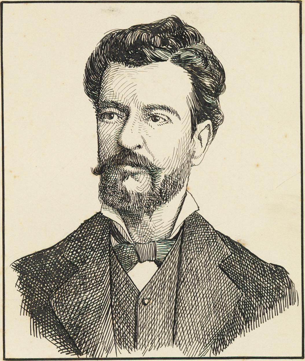 Bernardo Guimarães